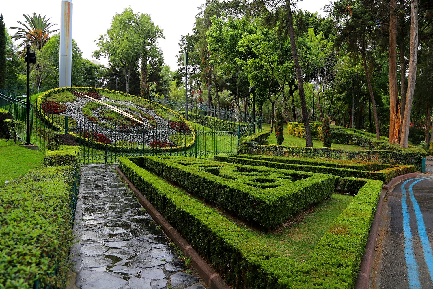 Parque Hundido "Luis G. Urbina", Ciudad de México